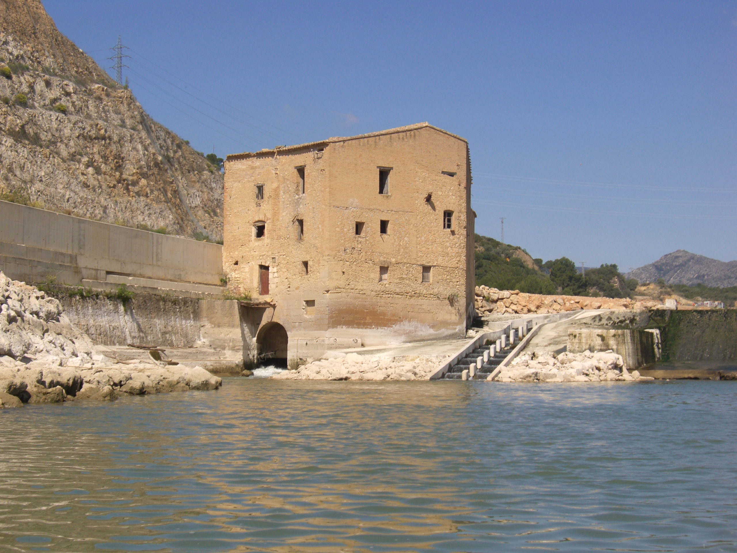 Una vista del Molí de l'Assut de Xerta